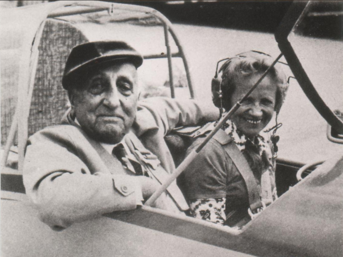 Beschreibung: Karl Ritter mit der bekannten Fliegerin Hanna Reitsch in einem Scheibe-Falken Segelflugzeug 1968 Quelle: Familienbesitz